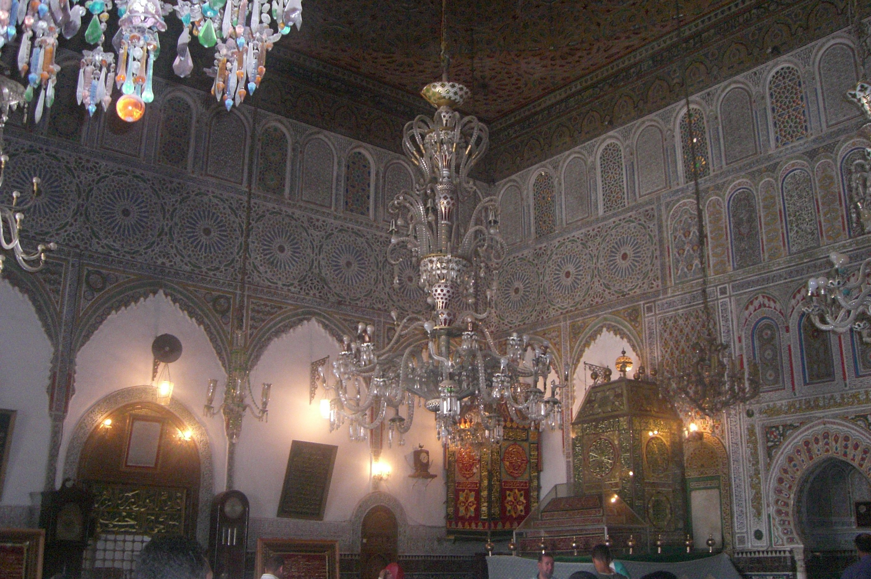 Fès Mausoleum Moulay Idriss II